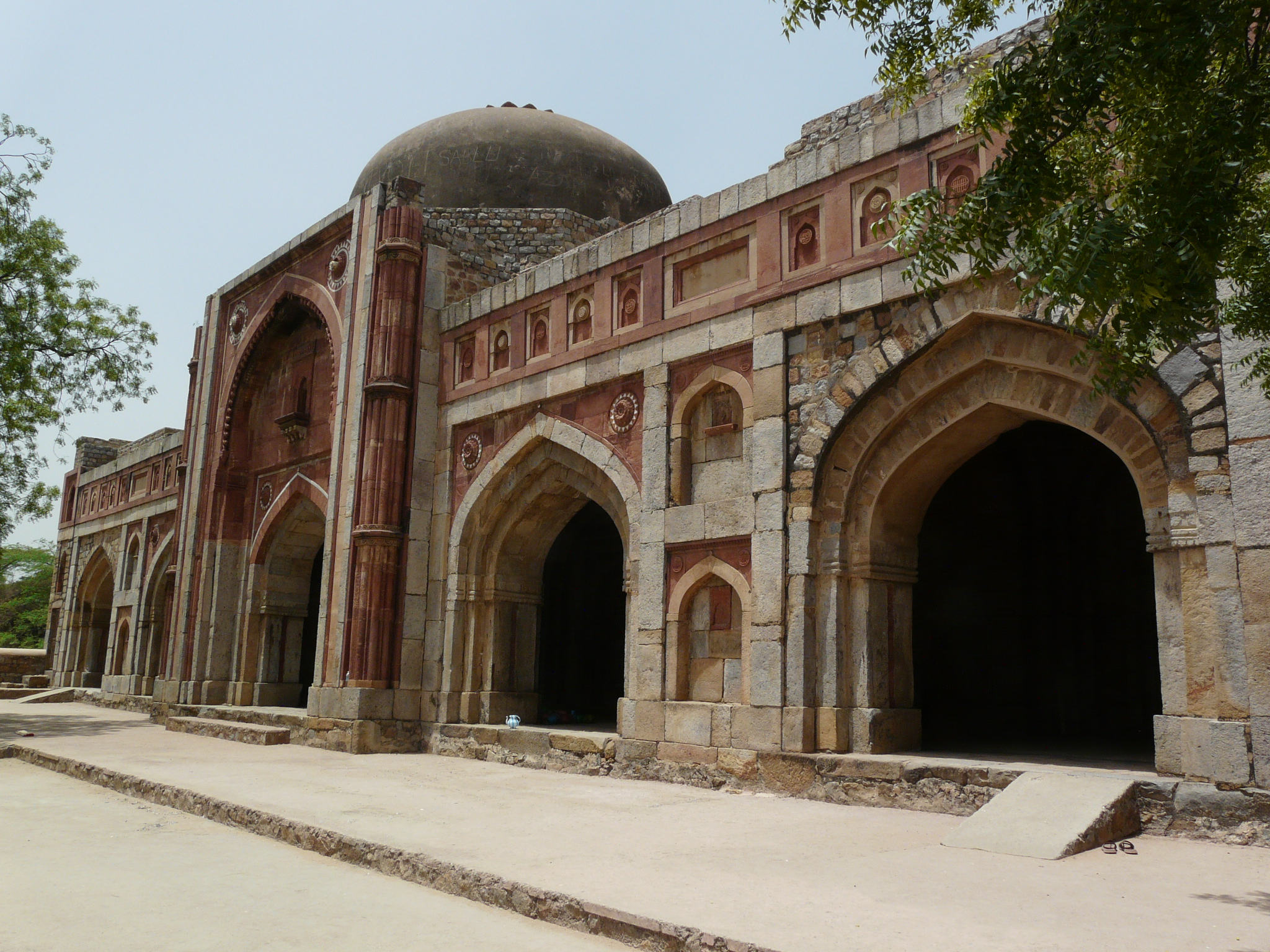 Jamali Kamali mosque